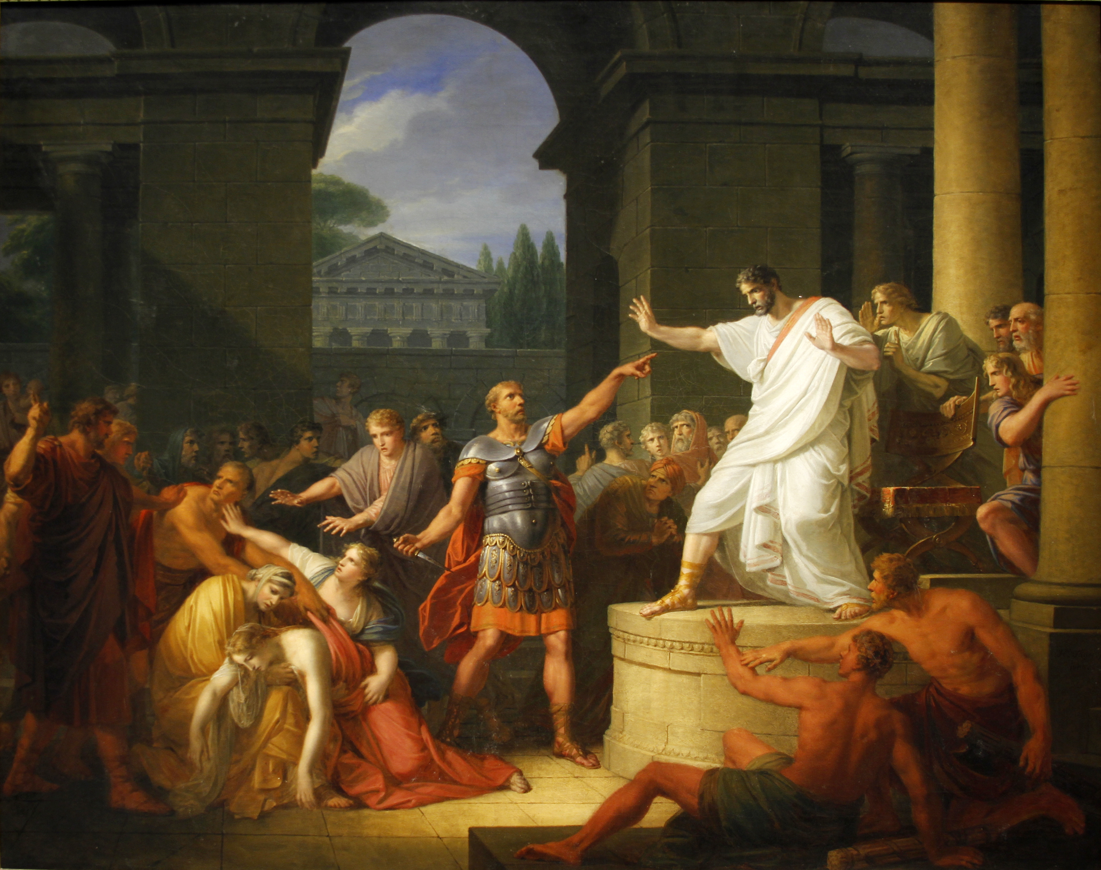 Staatsgalerie - Stuttgart - Germany